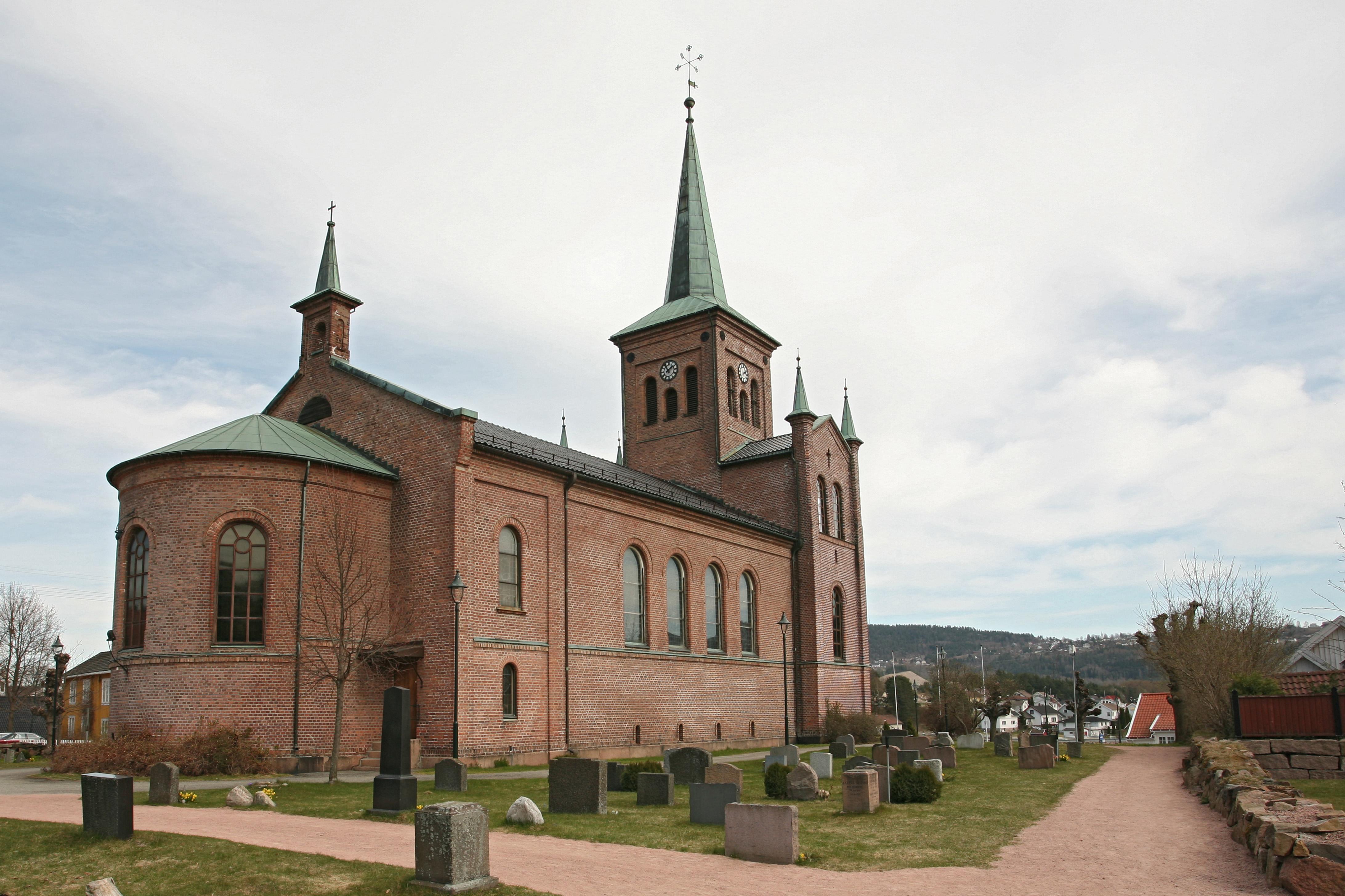 Picture of Svelvik Kirke (Vestfold - Norway)